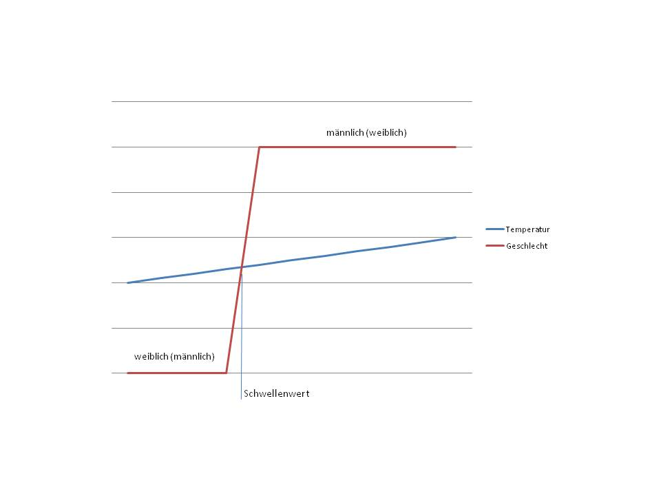 Temperaturabhängige Geschlechtsbestimmung